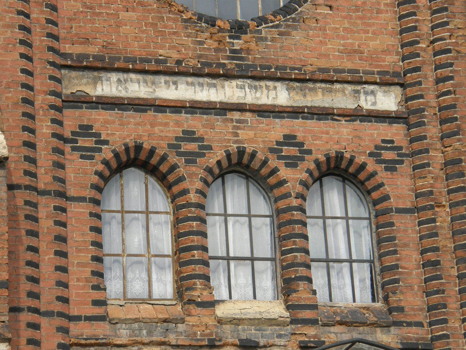 Nová synagoga ve Velkém Meziříčí - současný stav